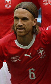 Сборная Швеции зрелищно вышла в четвертьфинал ЧМ-2018